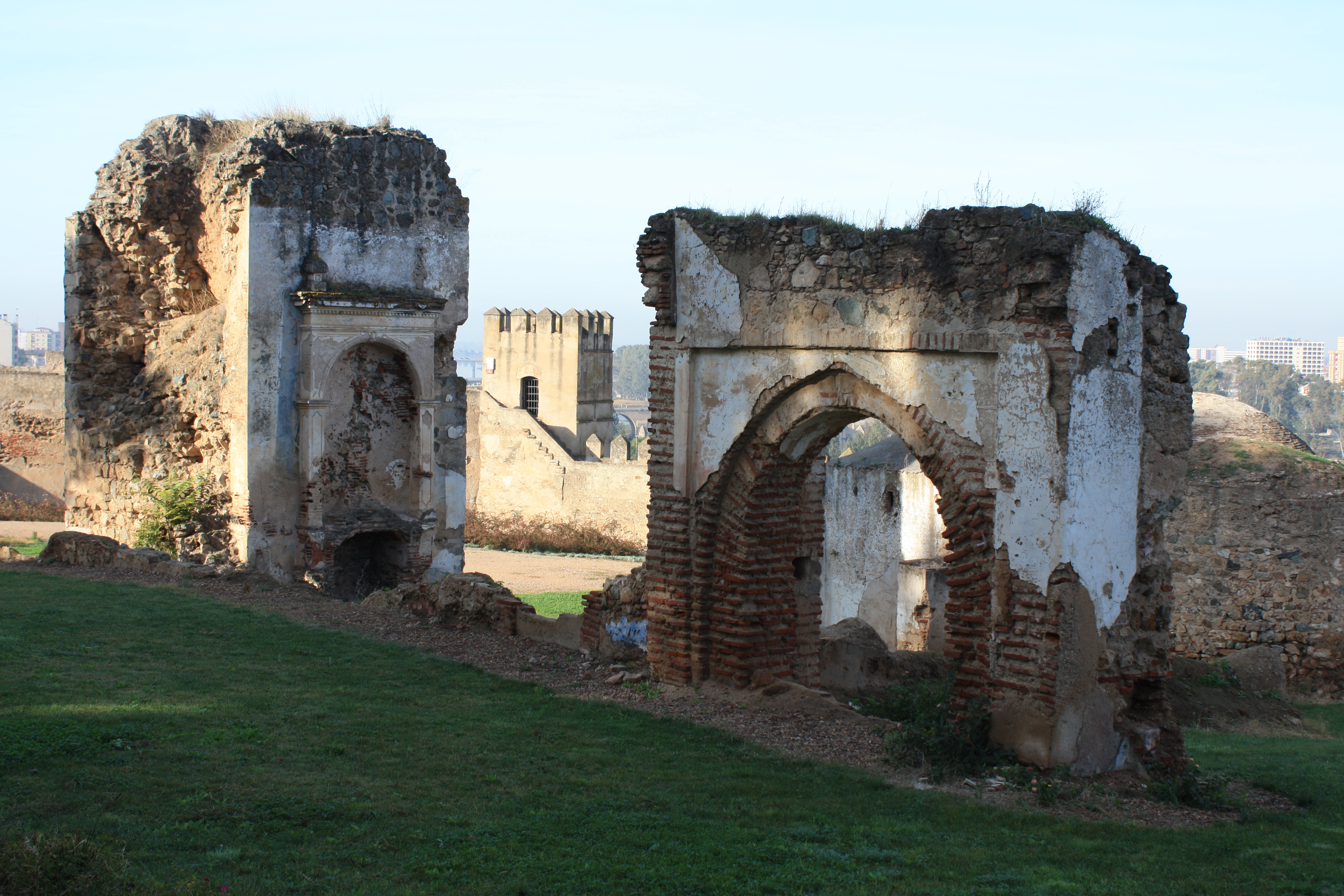 Ruins of Alcazaba, Badajoz (ES)